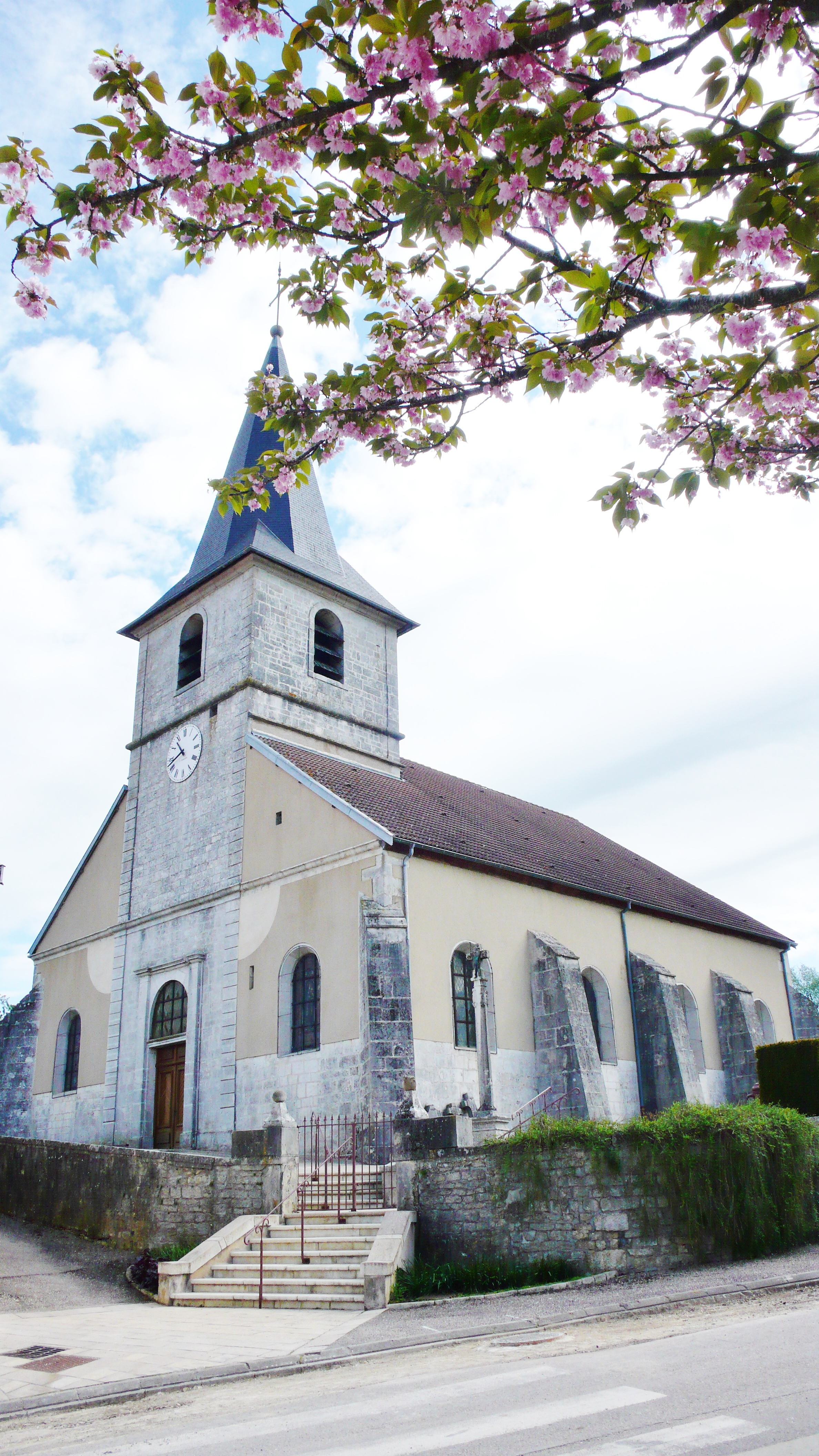 Attignéville (Vosges).Vue d'ensemble au cœur du village. Église Saint-Lambert